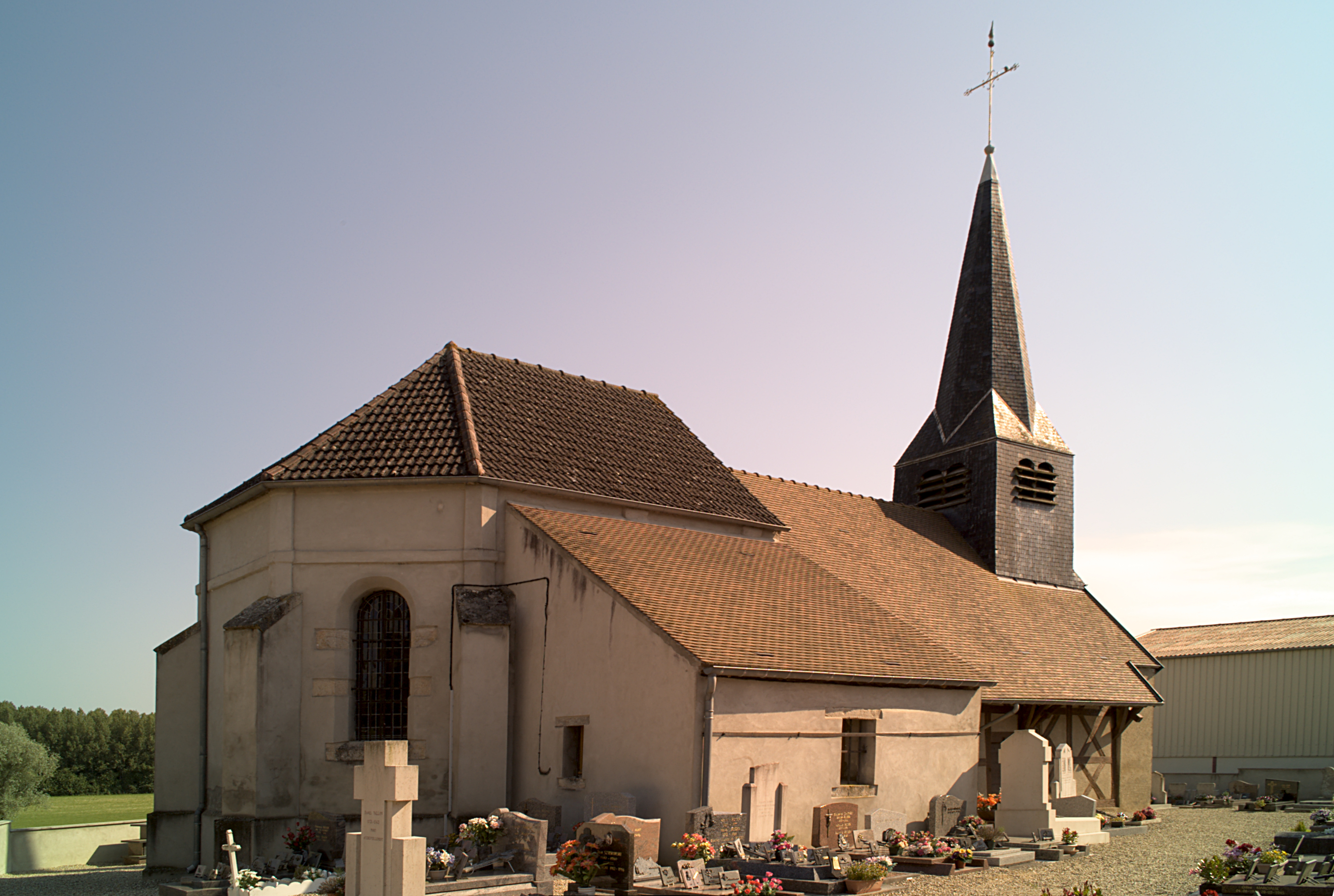 Clocher de l'église paroissiale Saint-Martin, Mont-lès-Seurre (Saône-et-Loire, Bourgogne, France)